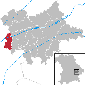 Niederviehbach in Bavaria - District Dingolfing-Landau